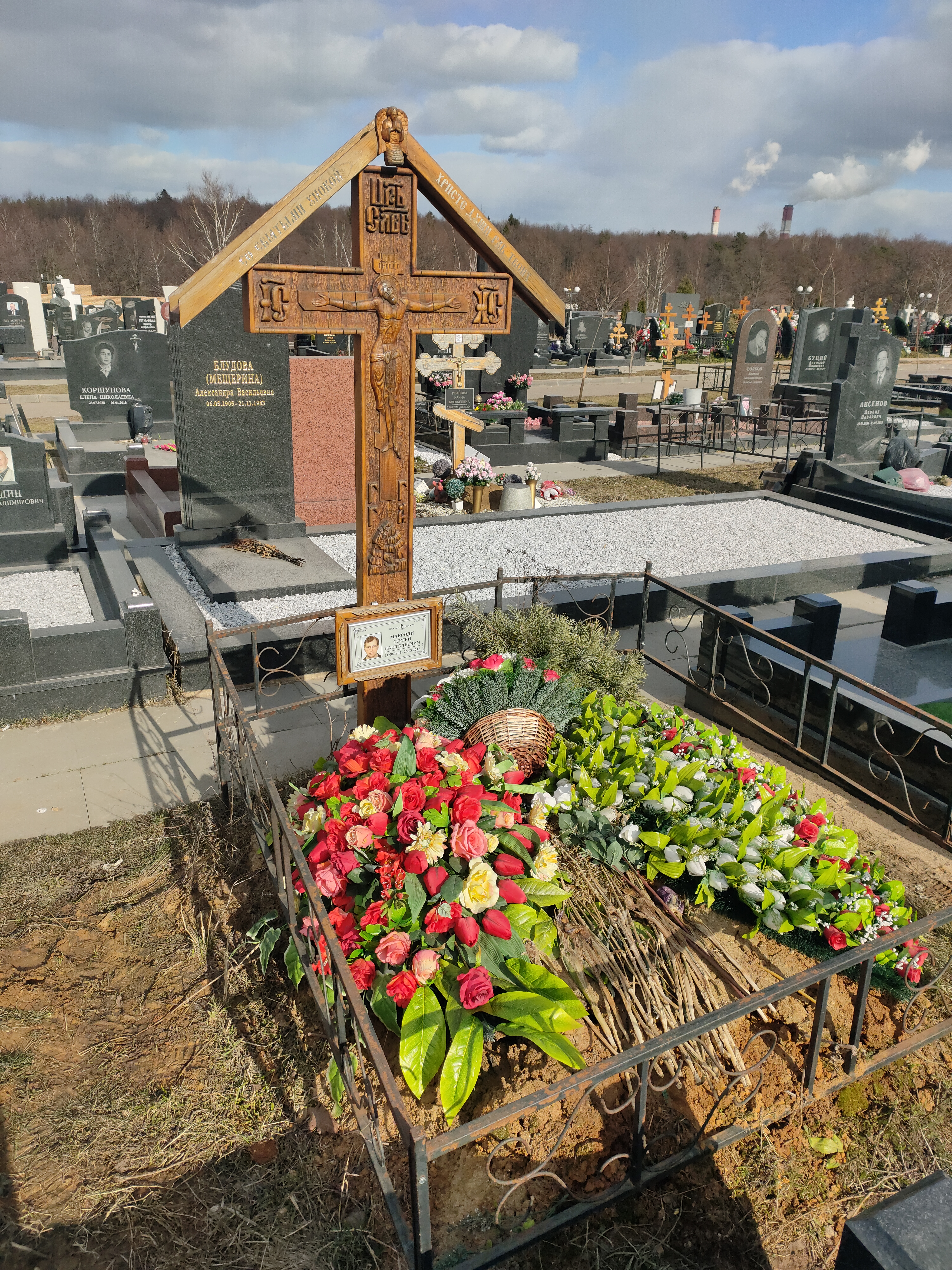 Могила Сергея Мавроди на Троекуровском кладбище